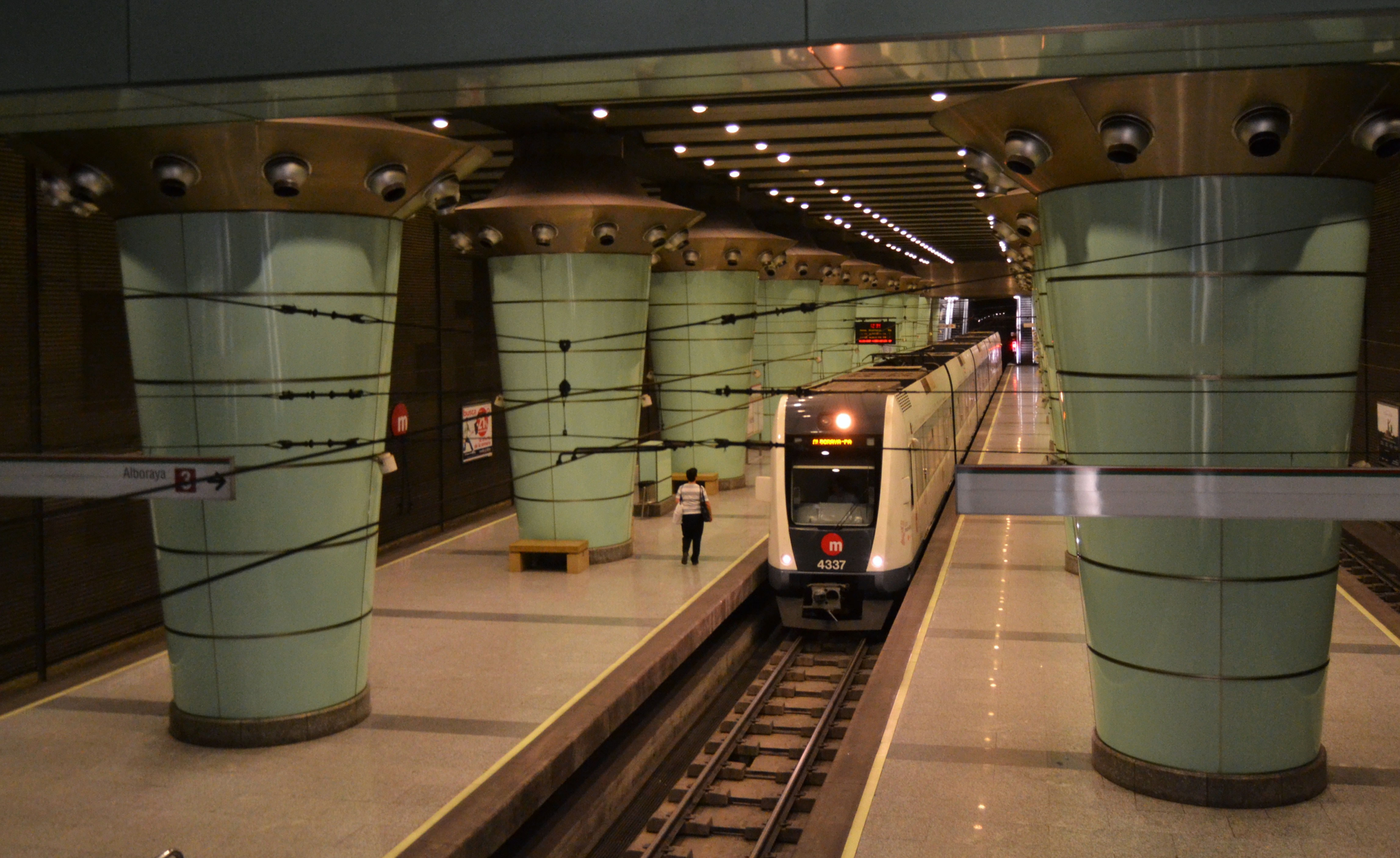 Estació d'Avinguda del Cid, València.